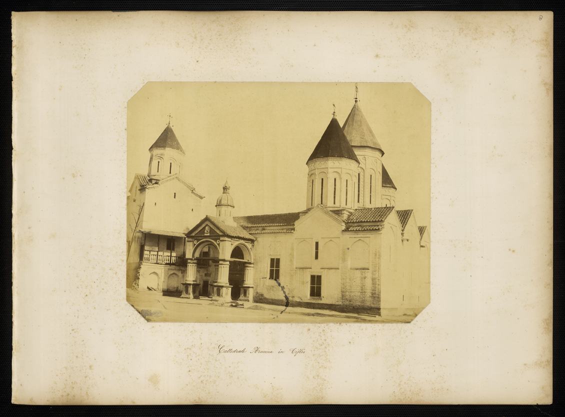 Montabone, Luigi - Cattedrale Armena in Tiflis